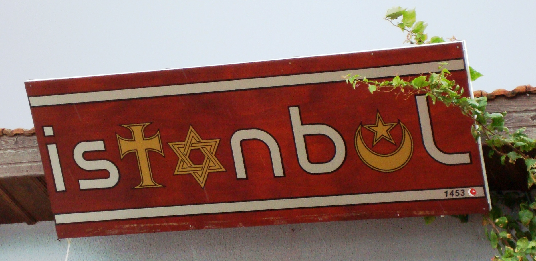 Istanbul